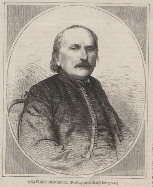 Franciszek Ksawery Godebski (1801-1869)